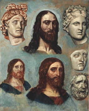 Голова Христа (три варианта). Гипсовые головы Аполлона Бельведерского, Венеры Медицейской, Лаокоона и маска, обобщающая предыдущие три типа, в повороте головы Христа. Этюд для картины "Явление Христа народу".